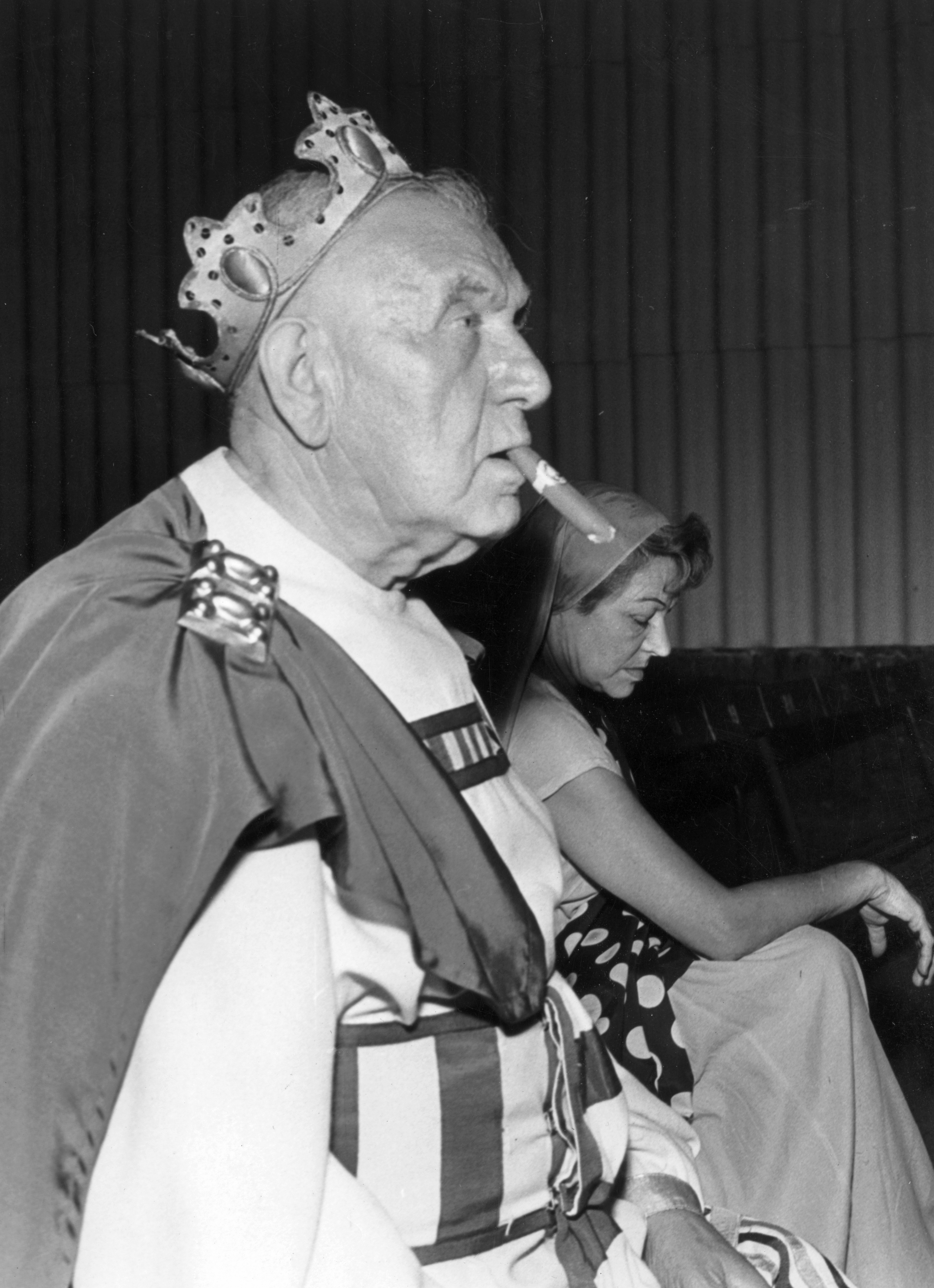 Salamon Béla színművész mint Bölcs Salamon.